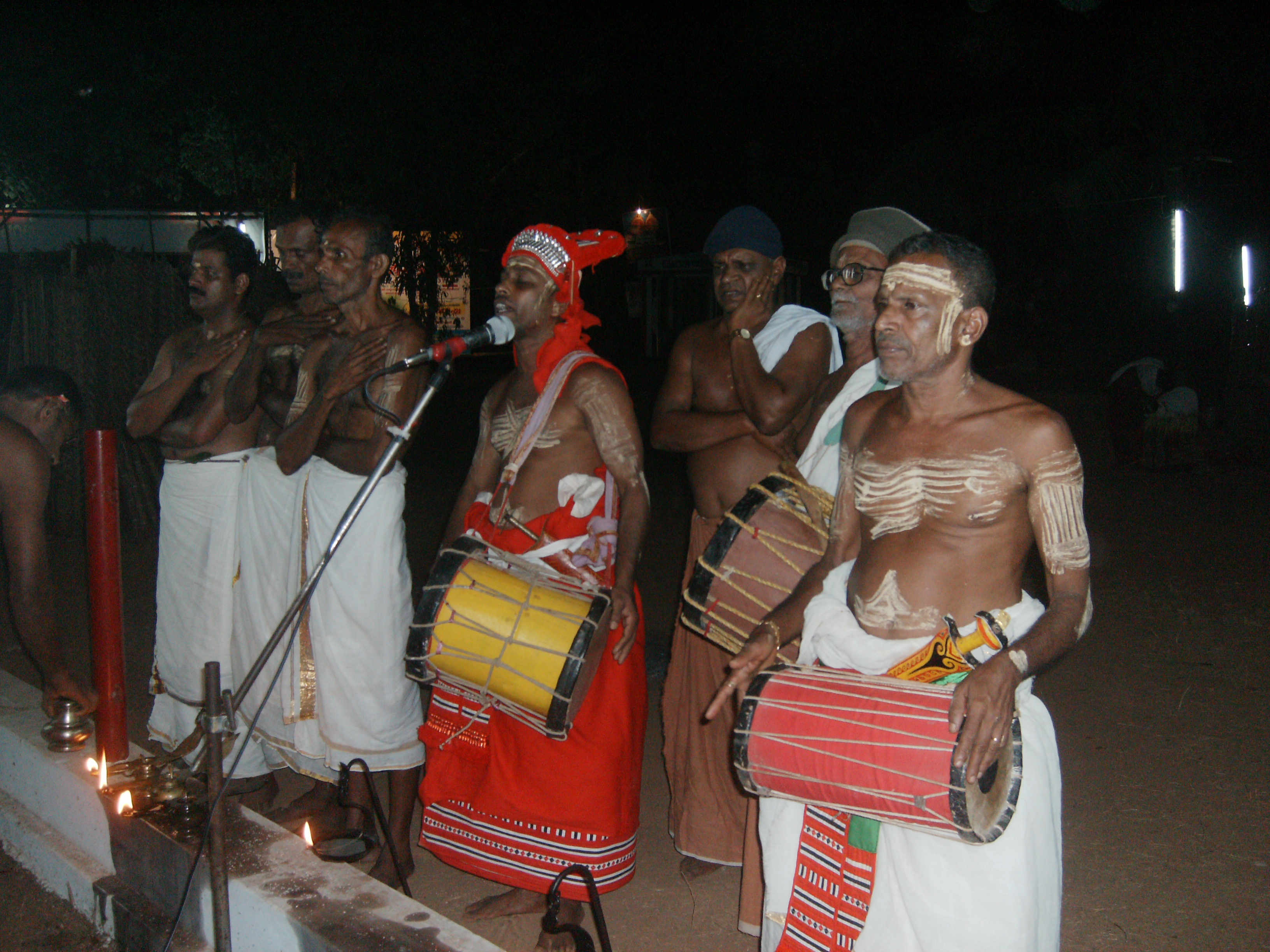 കണ്ണൂര്‍ ജില്ലയിലെ കണ്ണപുരം പഞ്ചായത്തിലെ കീഴറ കൂലോം ഭഗവതി ക്ഷേത്രത്തിലെ തോറ്റം.